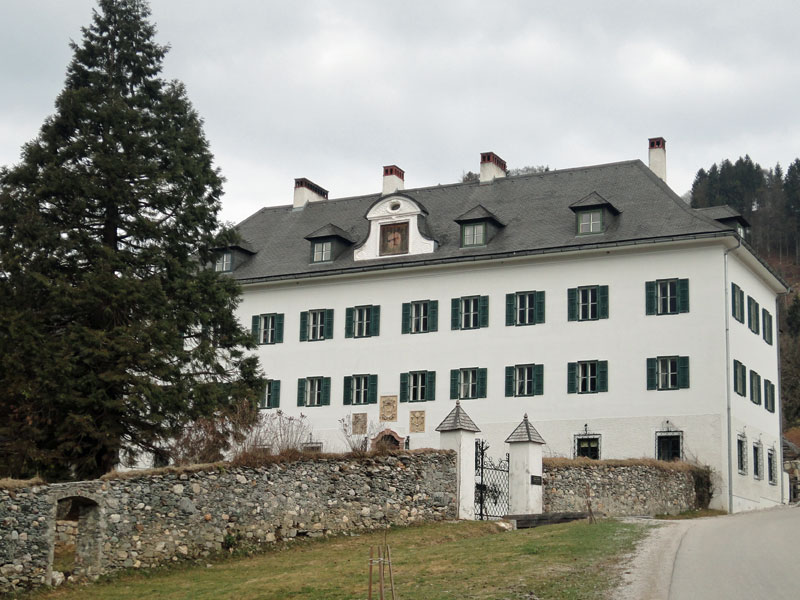 Schloss Gstatt ist im Privatbesitz des Adelsgeschlechts Colloredo-Mannsfeld.